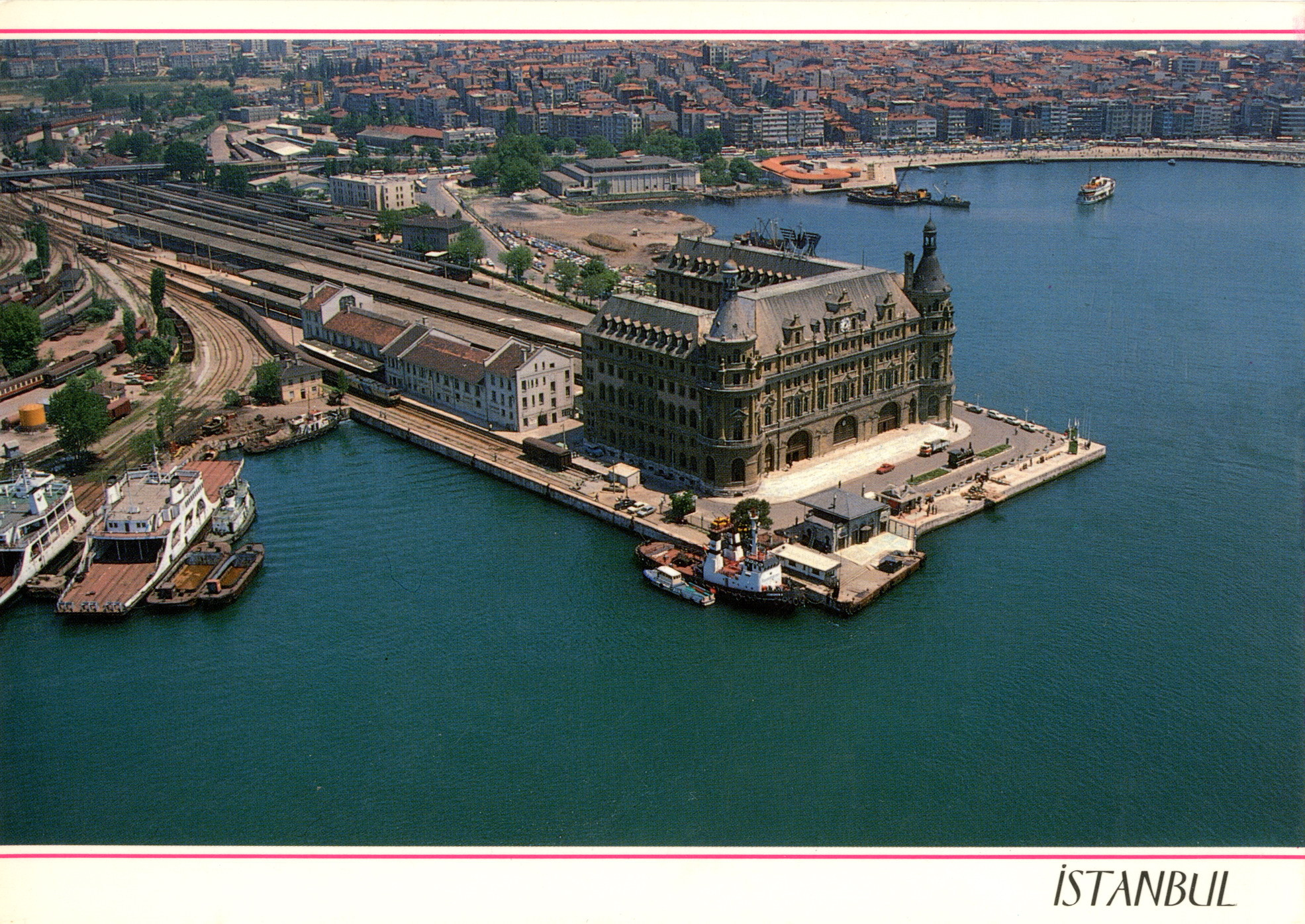 A view of Haydarpaşa Terminal taken from a plane SALT Research, Photograph Archive Haydarpaşa Garı'nın uçaktan görünümü, İstanbul SALT Araştırma, Fotoğraf Arşivi